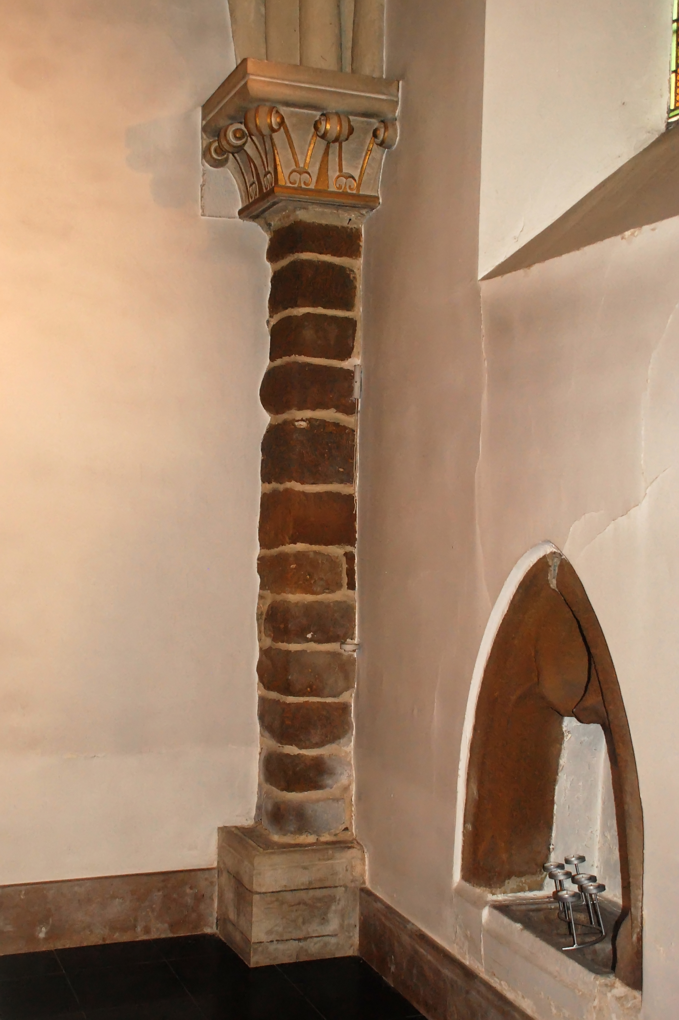 Belgique - Brabant wallon - Chaumont-Gistoux - Église Saint-Bavon de Chaumont